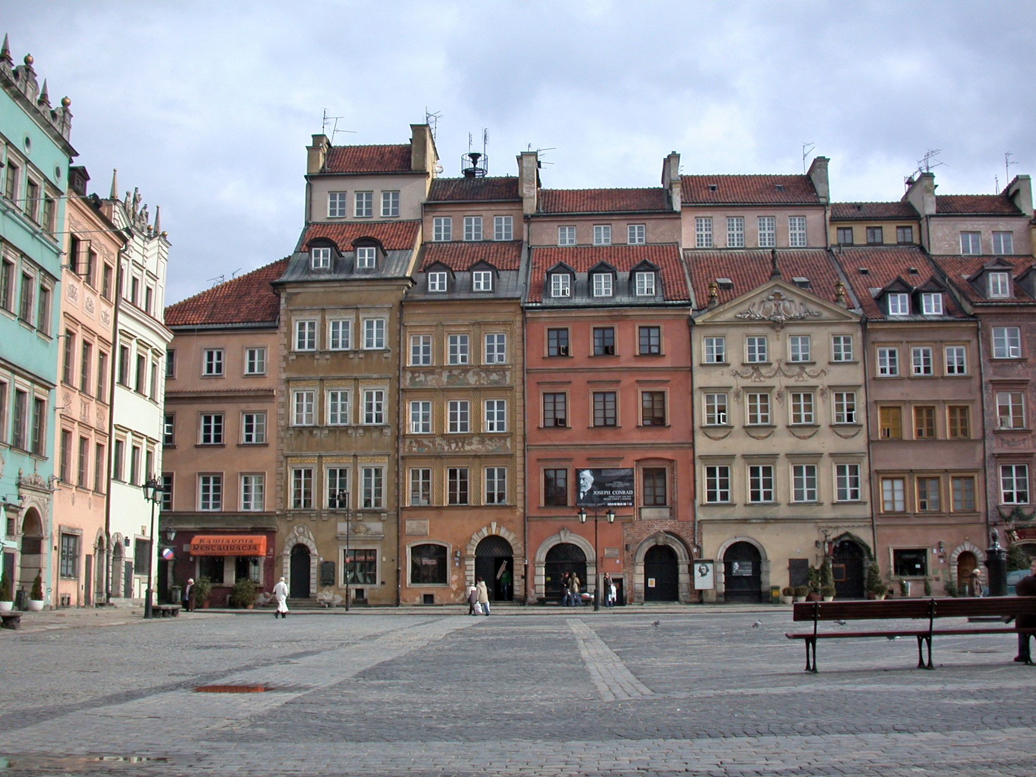 Varsavia, Piazza del Mercato della Città Vecchia (Rynek Starego Miasta), lato Barss (nordorientale): la quarta casa da sinistra (casa Orlemus) e la quinta (casa Balcer), del XV secolo, rimaneggiate in epoca barocca e ricostruite dopo il 1944, ospitano il Museo della letteratura dedicato ad Adam Mickiewicz (Muzeum Literatury im A. Mickiewicza)